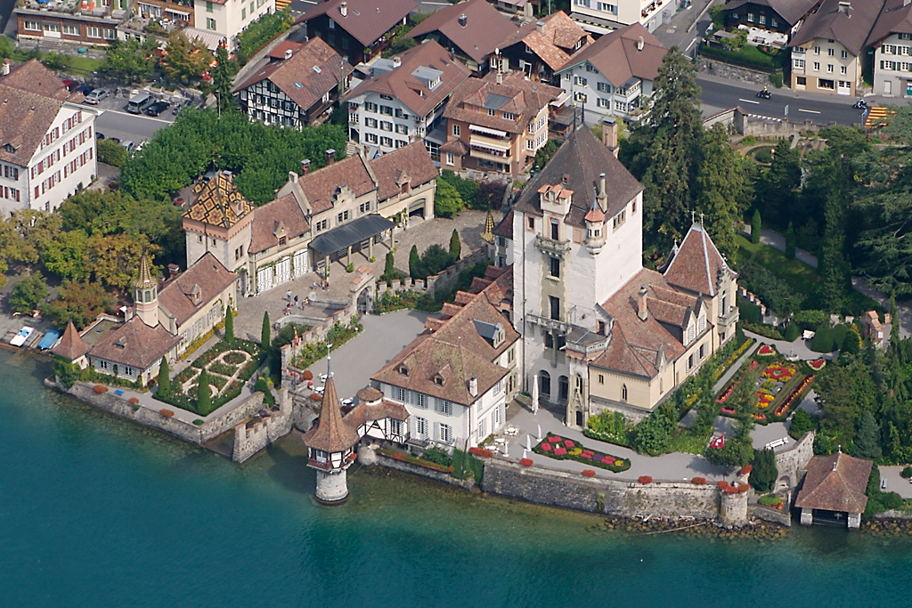 Schloss Oberhofen, Schweiz